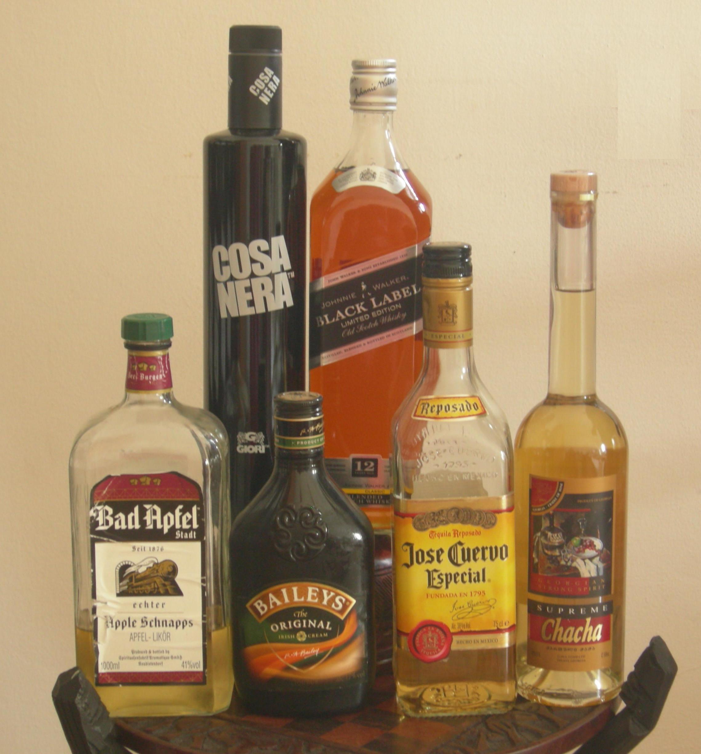 תמונה נקייה וברורה של מקבץ משקאות משכרים בניי זמננו.